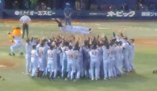 2014年9月26日、セ・リーグ公式戦「DeNA×巨人」（横浜スタジアム）。この試合で巨人が3年連続36度目のセ・リーグ優勝を決め、歓喜の巨人ナイン、そして胴上げされる原辰徳監督。なお、巨人はクライマックスシリーズで阪神に4連敗し、日本シリーズ出場を逃している。 横浜スタジアムにて撮影したものをPaintgraphic2にてトリミング加工。